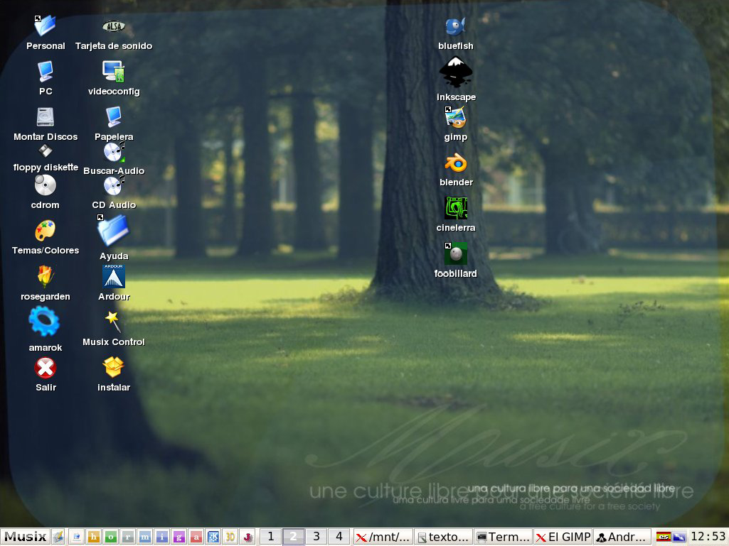 Escritorio de Musix GNU+Linux.